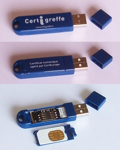 clé certigreffe, fermée puis ouverte